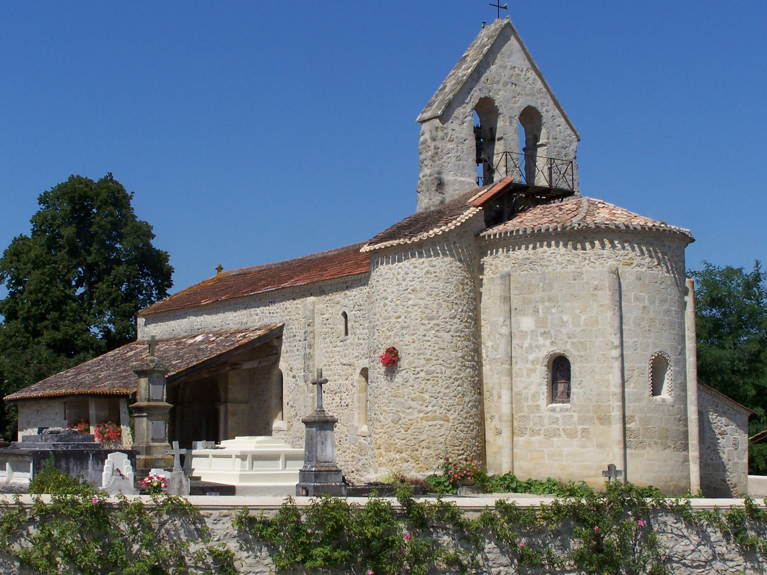 Église de Brannens, Gironde, France